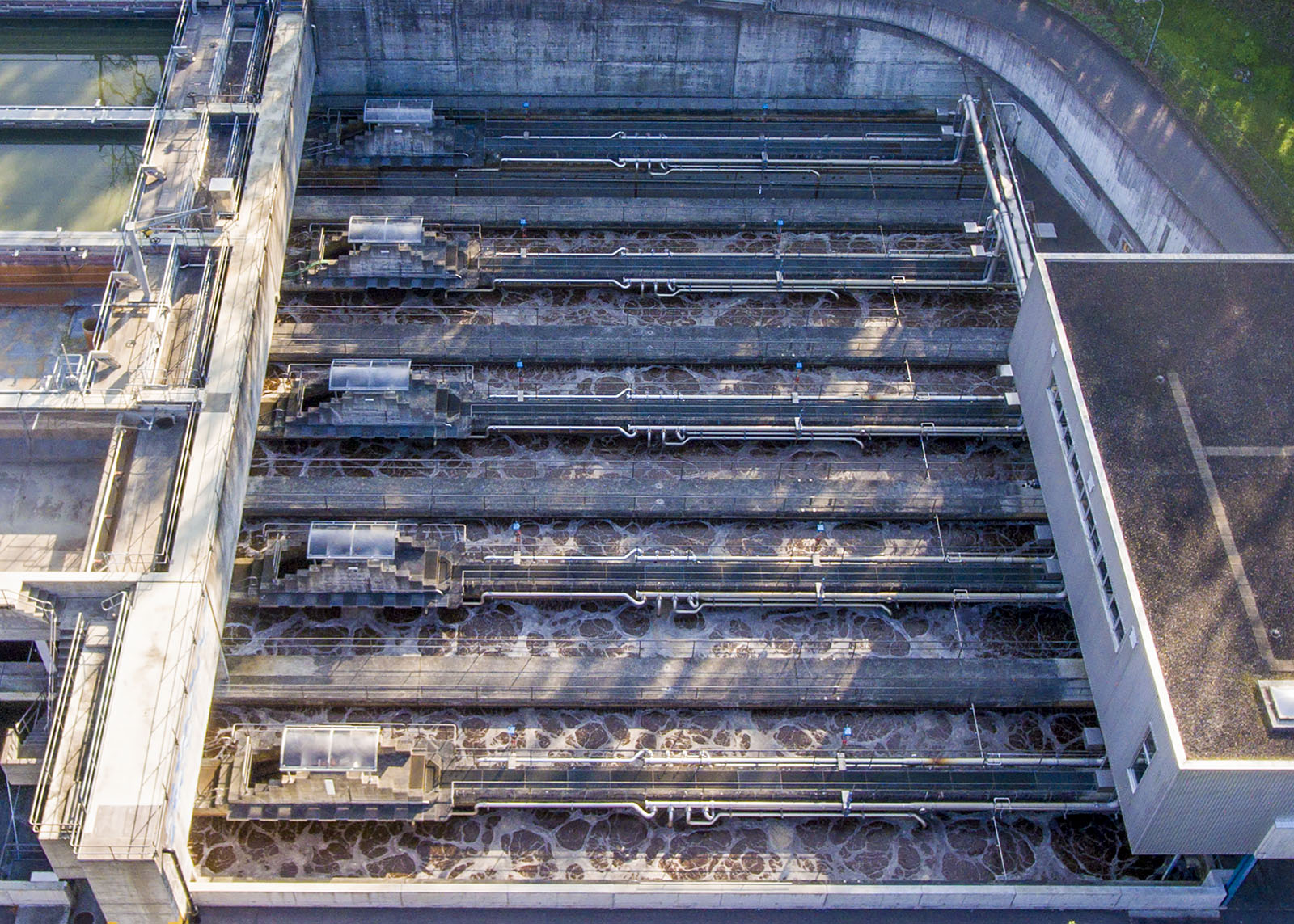 Luftbild der Belebtschlammanlage der ARA Worblental in Worblaufen